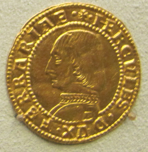 Ferrara, ercole I, ducato, 1471-1505